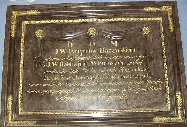 Epitafium Baczyńskich - Bidziny